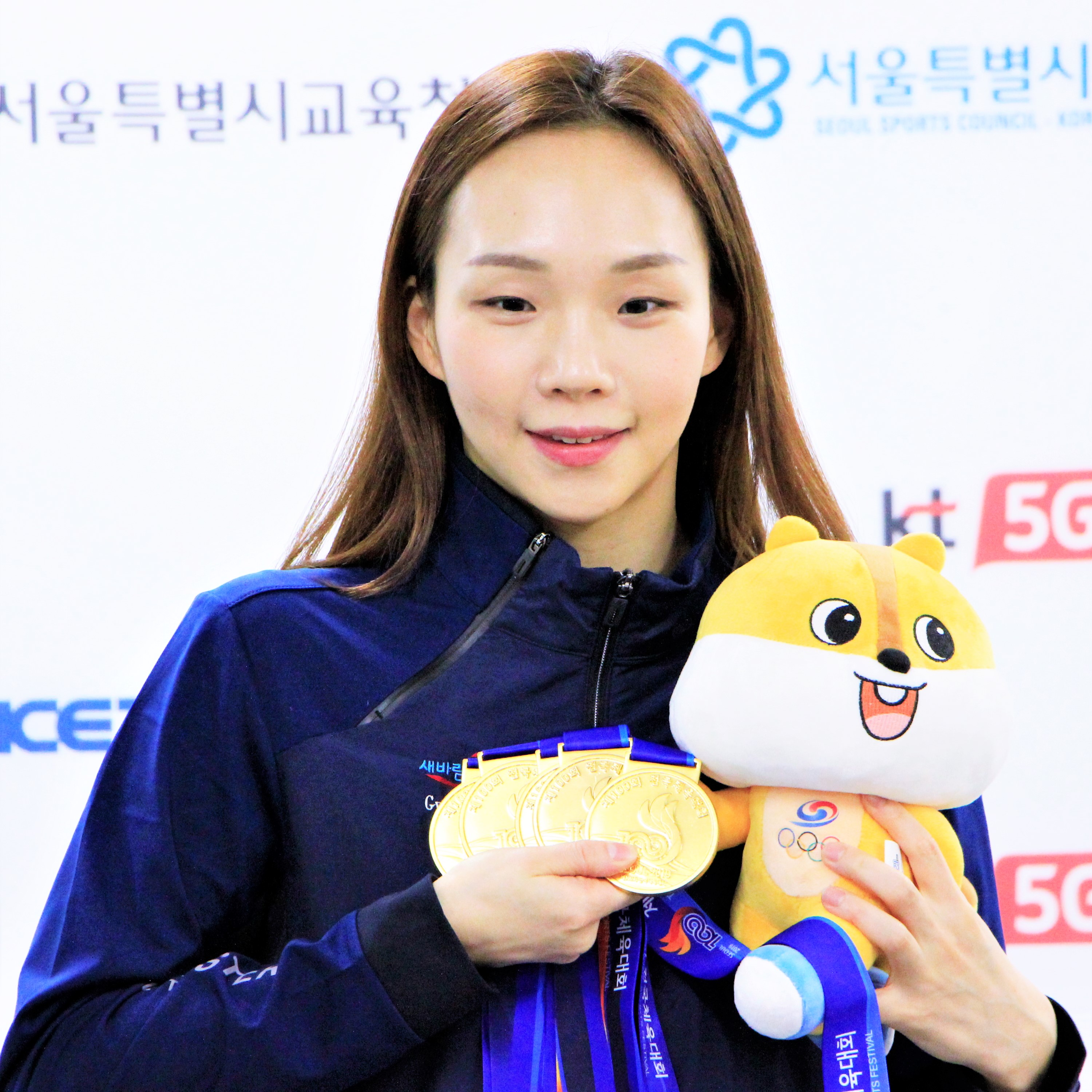 대한민국에서 열린 제100회 전국체육대회의 MVP로 지명된 한국의 수영선수 김서영